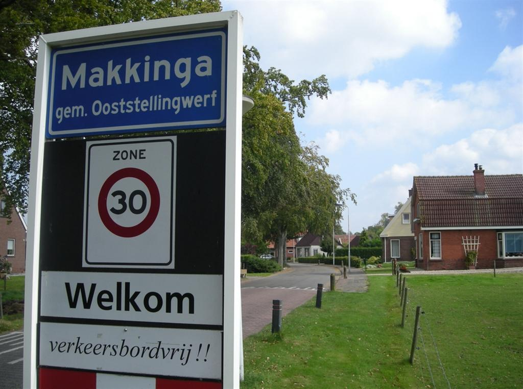 Makkinga